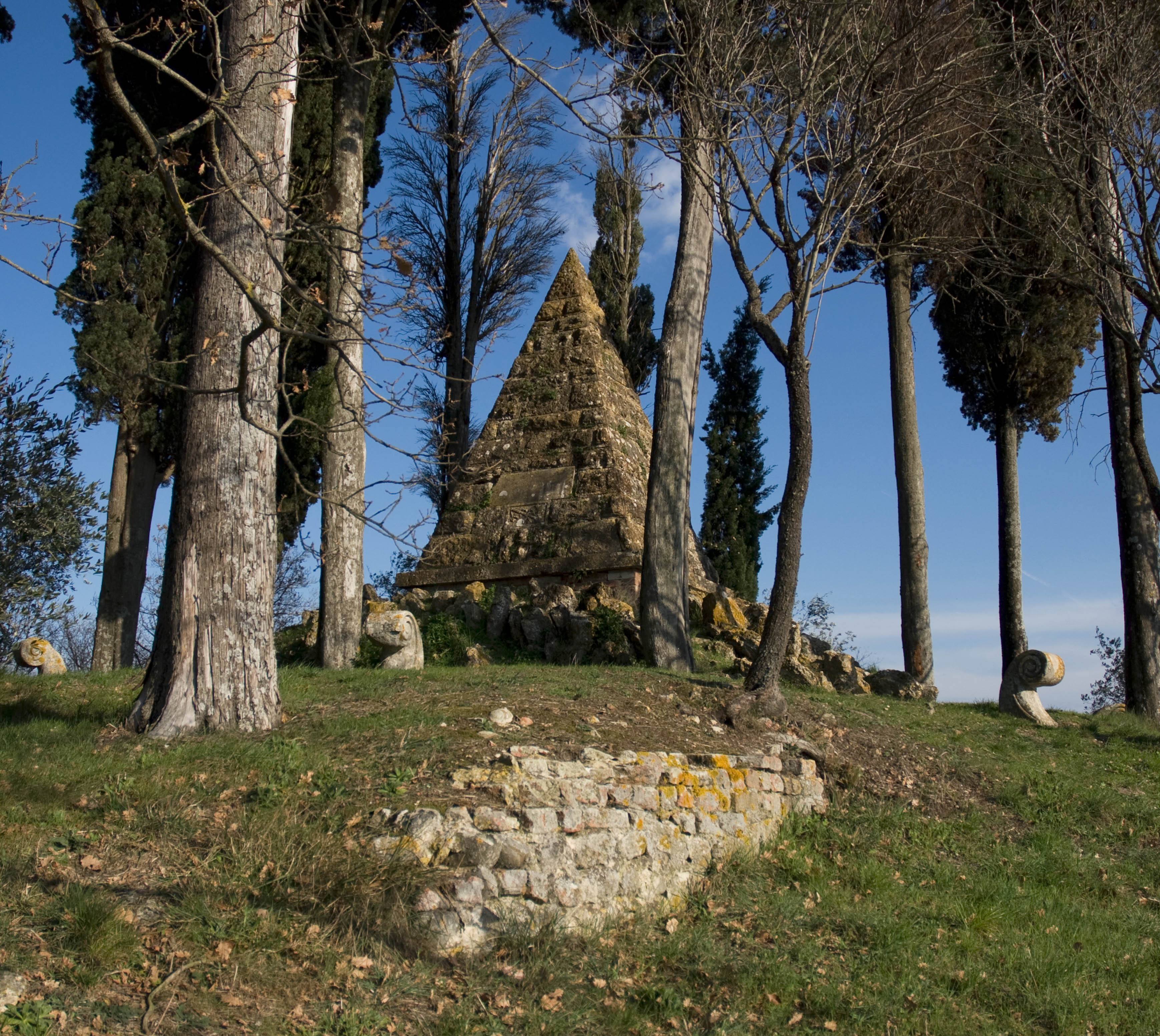 Piramide posta in ricordo della battaglia di Montaperti